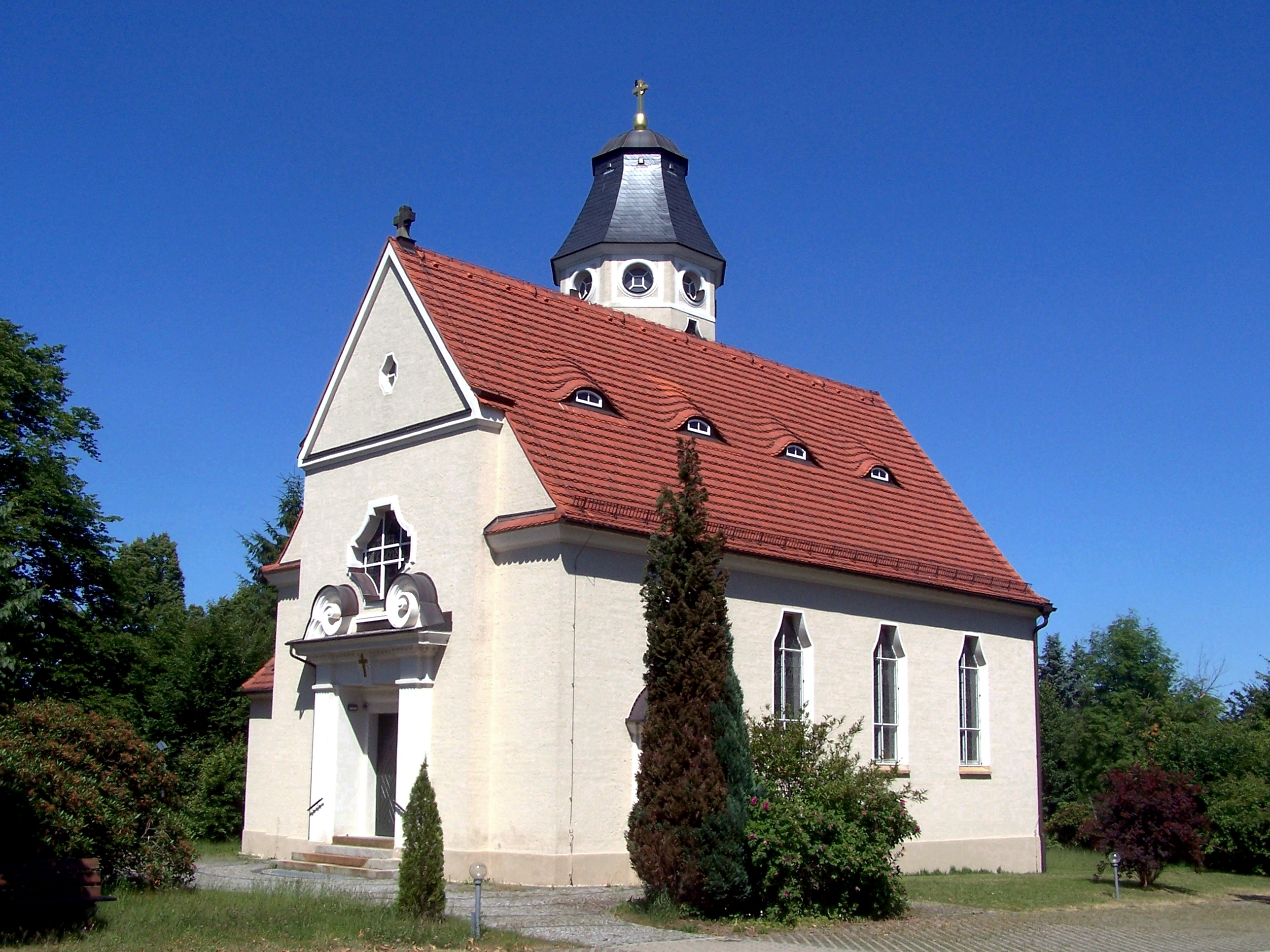 Katholische Pfarrkirche Kreuz Erhöhung in Königsbrück